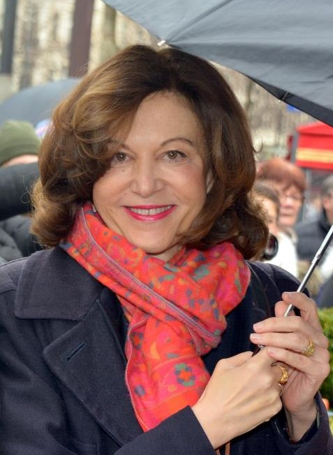 Anne Fontaine au déjeuner des nommés des César du cinéma.